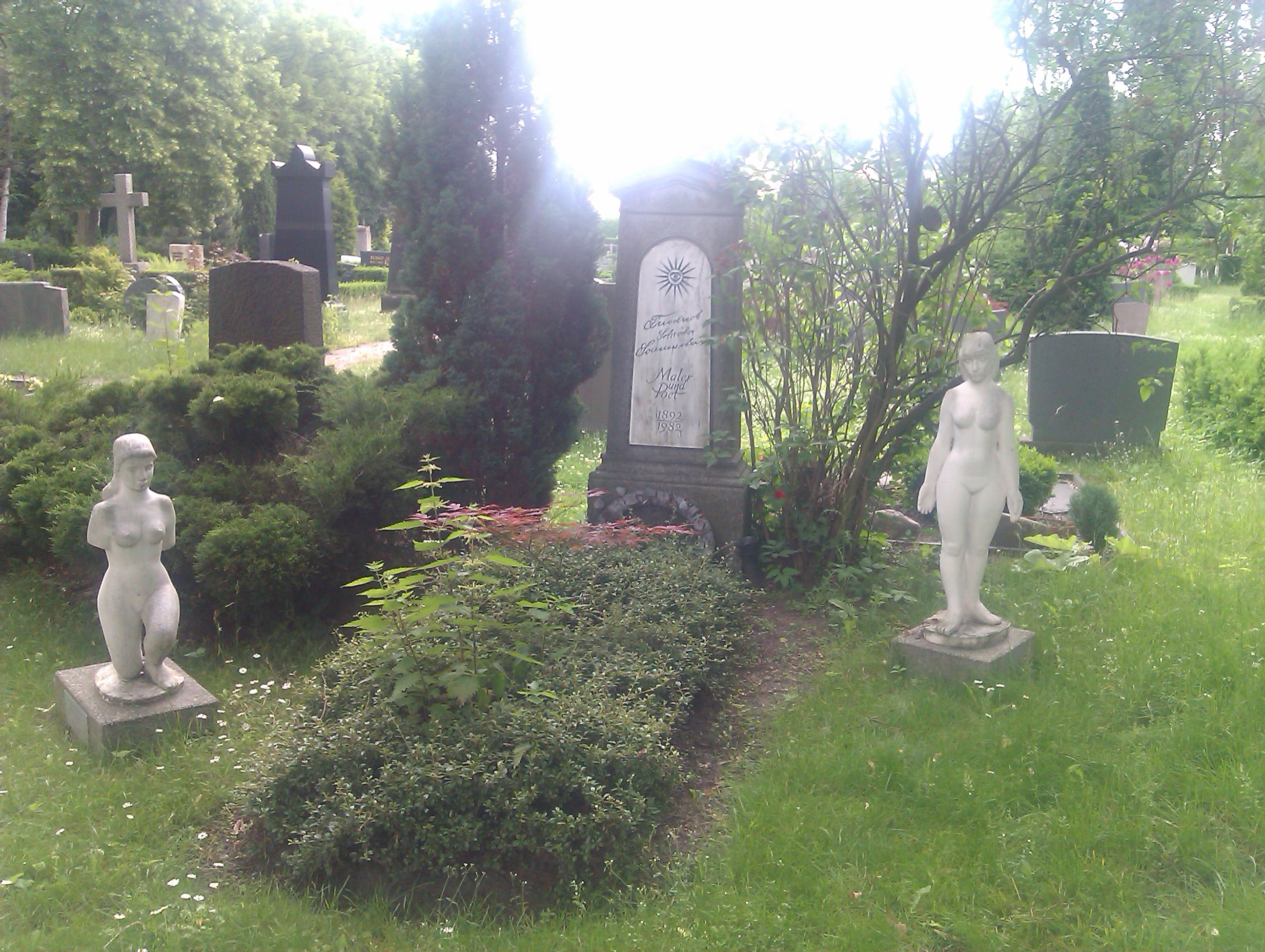 Grabstelle Friedrich Schröder Sonnenstern. Diese Aufnahme entstand auf dem 12 Apostel Friedhof im Juni 2013